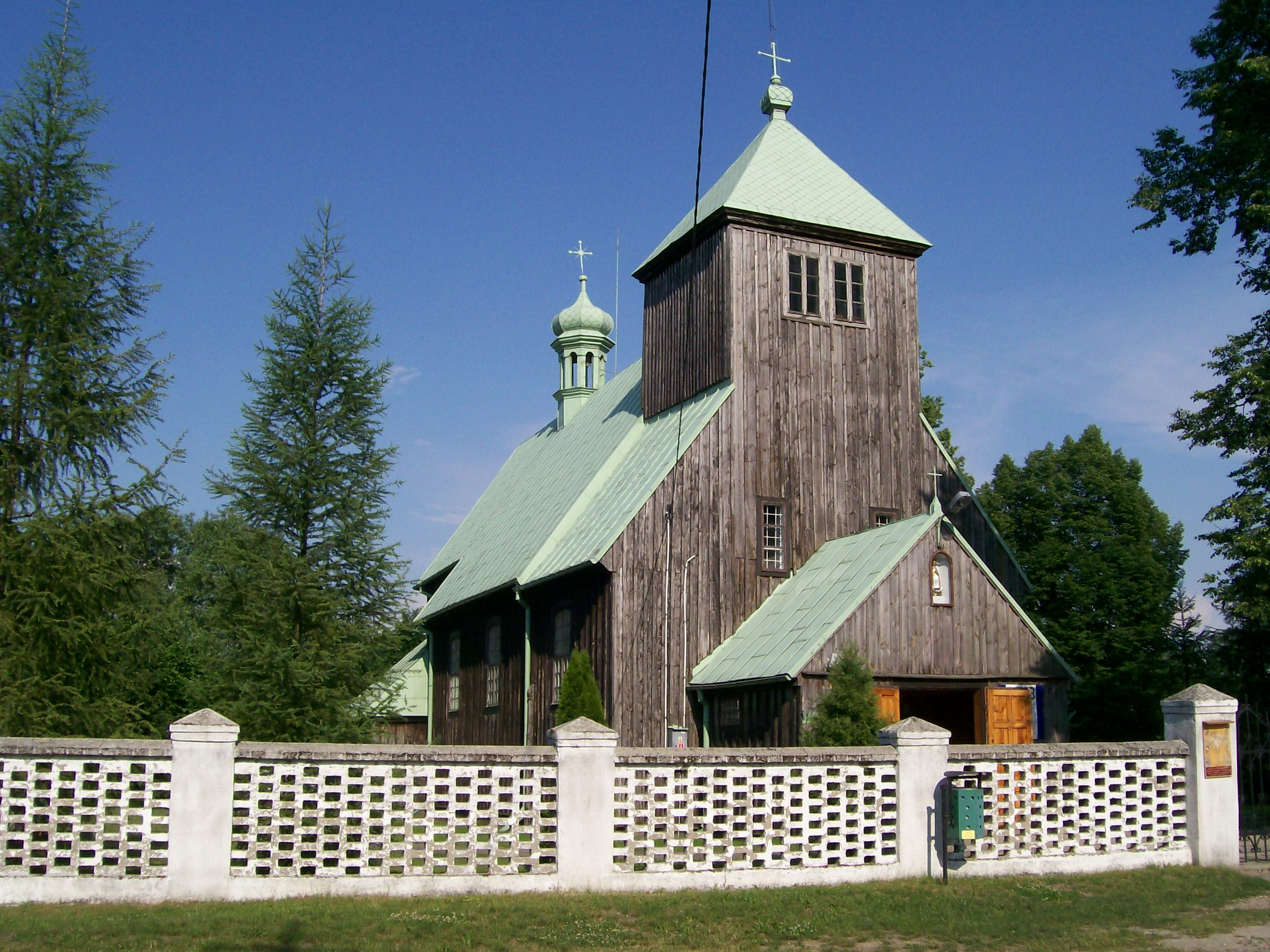 Łukomie - kościół parafialny pw. św. Katarzyny, drewn. 1761 (zabytek nr 436)